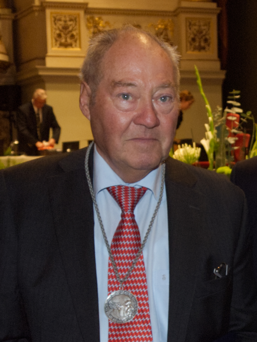 Klaus Hupe - Verleihung Paracelsus Medaille - DÄT 2010 Dresden